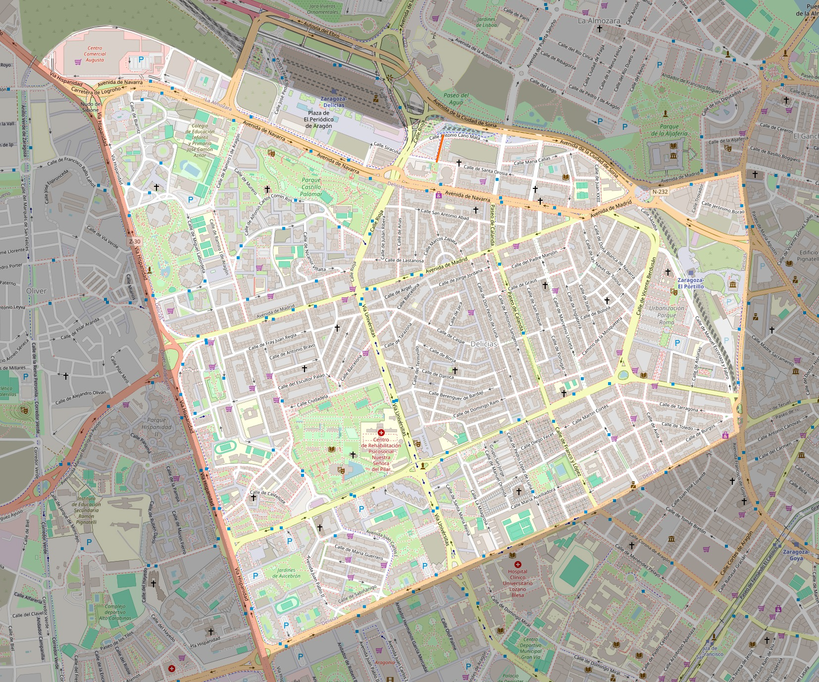 Mapa del distrito de las Delicias en Zaragoza.